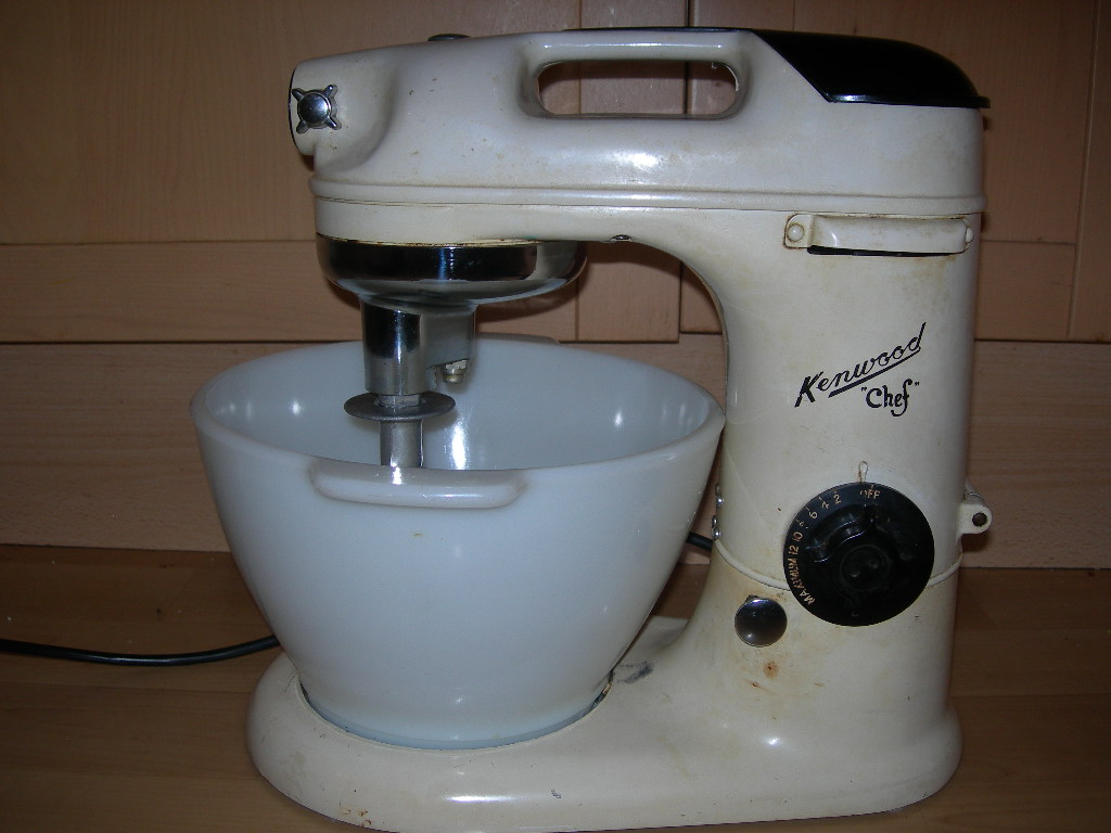 Kenwood Chef model A700.